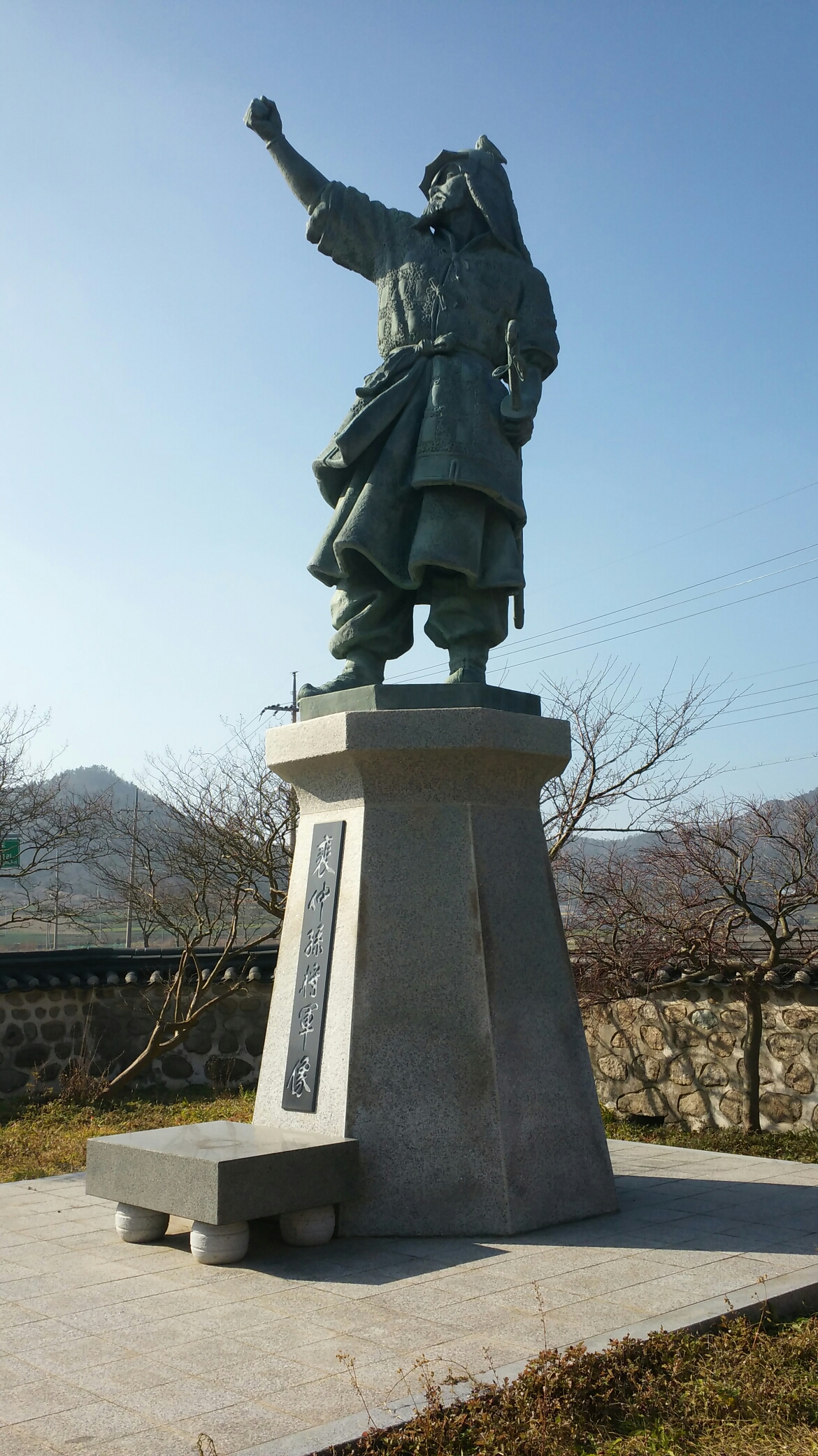 진도군 배중손 사당의 배중손 동상이다.